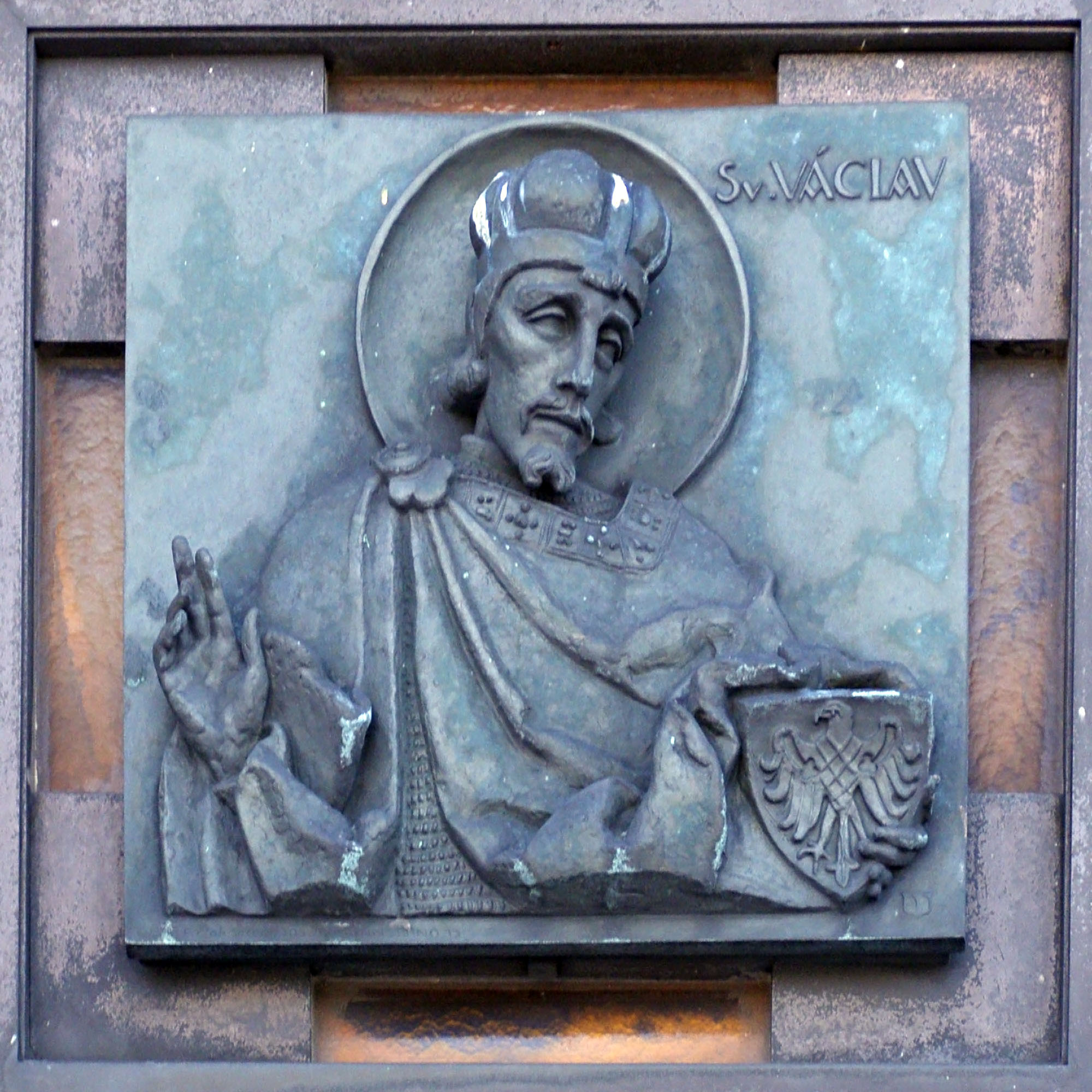 Hostýn, Bazilika Nanebevzetí Panny Marie, detail vstupních dveří: svatý Václav